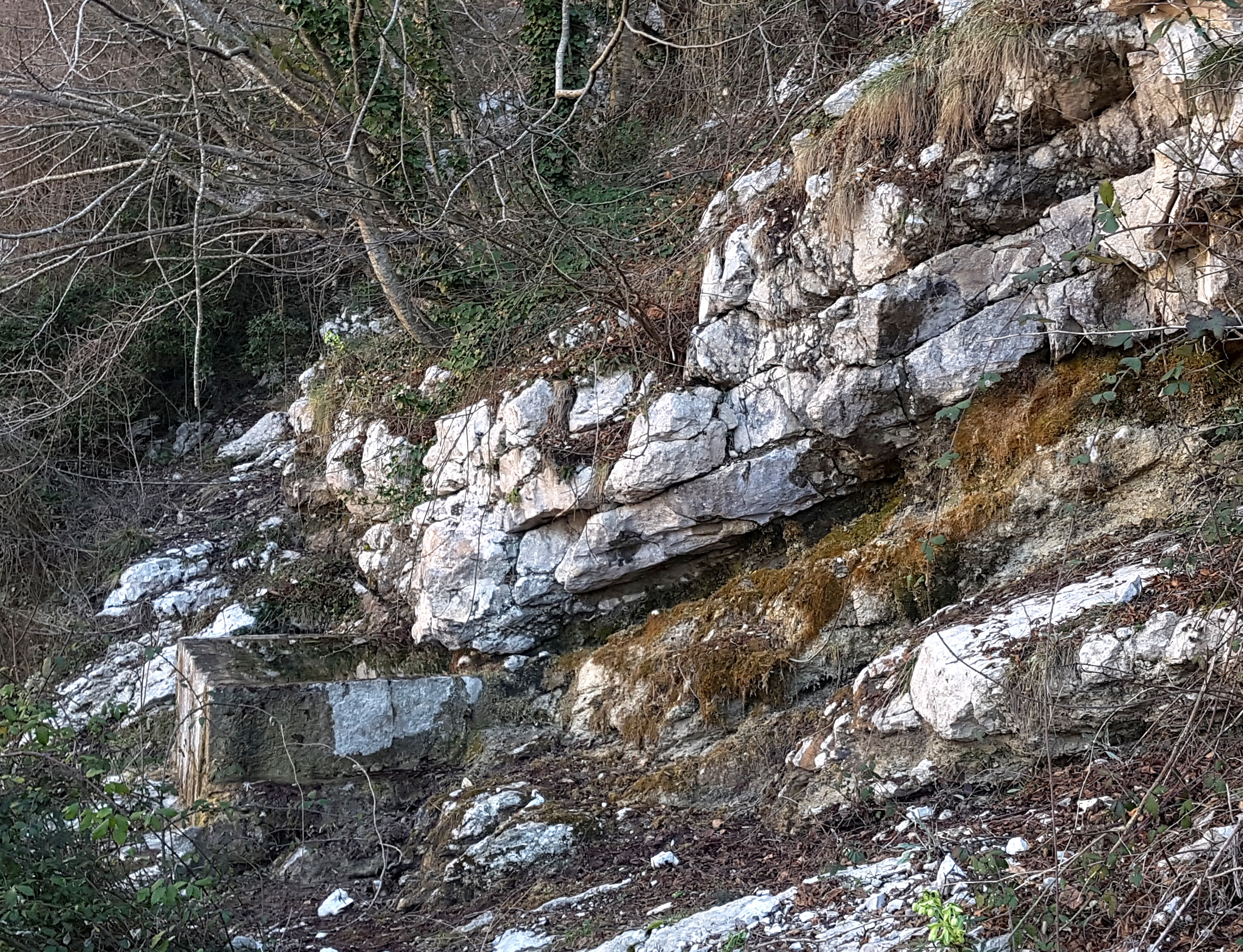 Acqua della Chiesa (fianco settentrionale Monte Semprevisa). Livello argilloso a Orbitolina